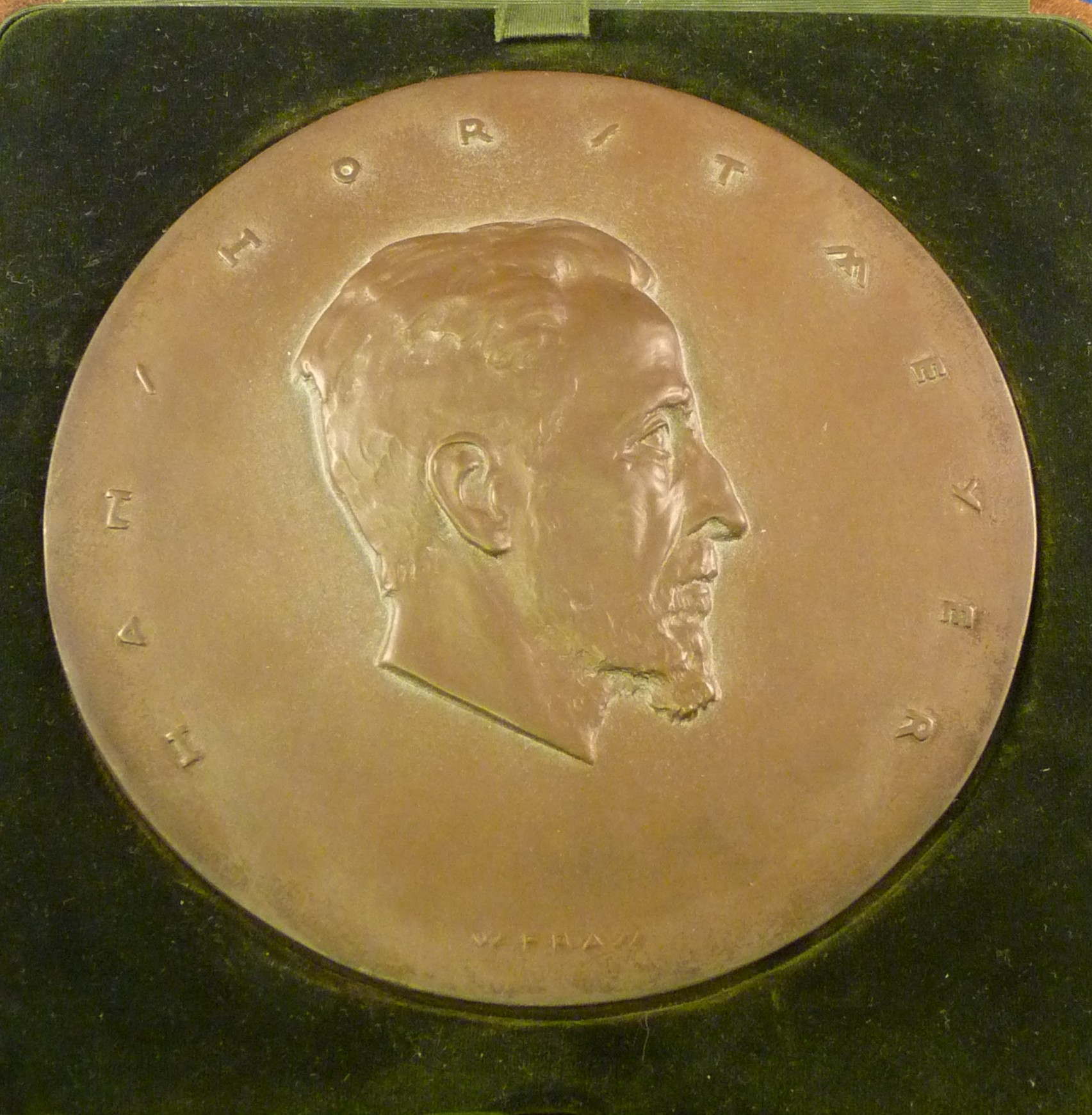 Reliefplatte mit Hans Horst Meyer im Profil